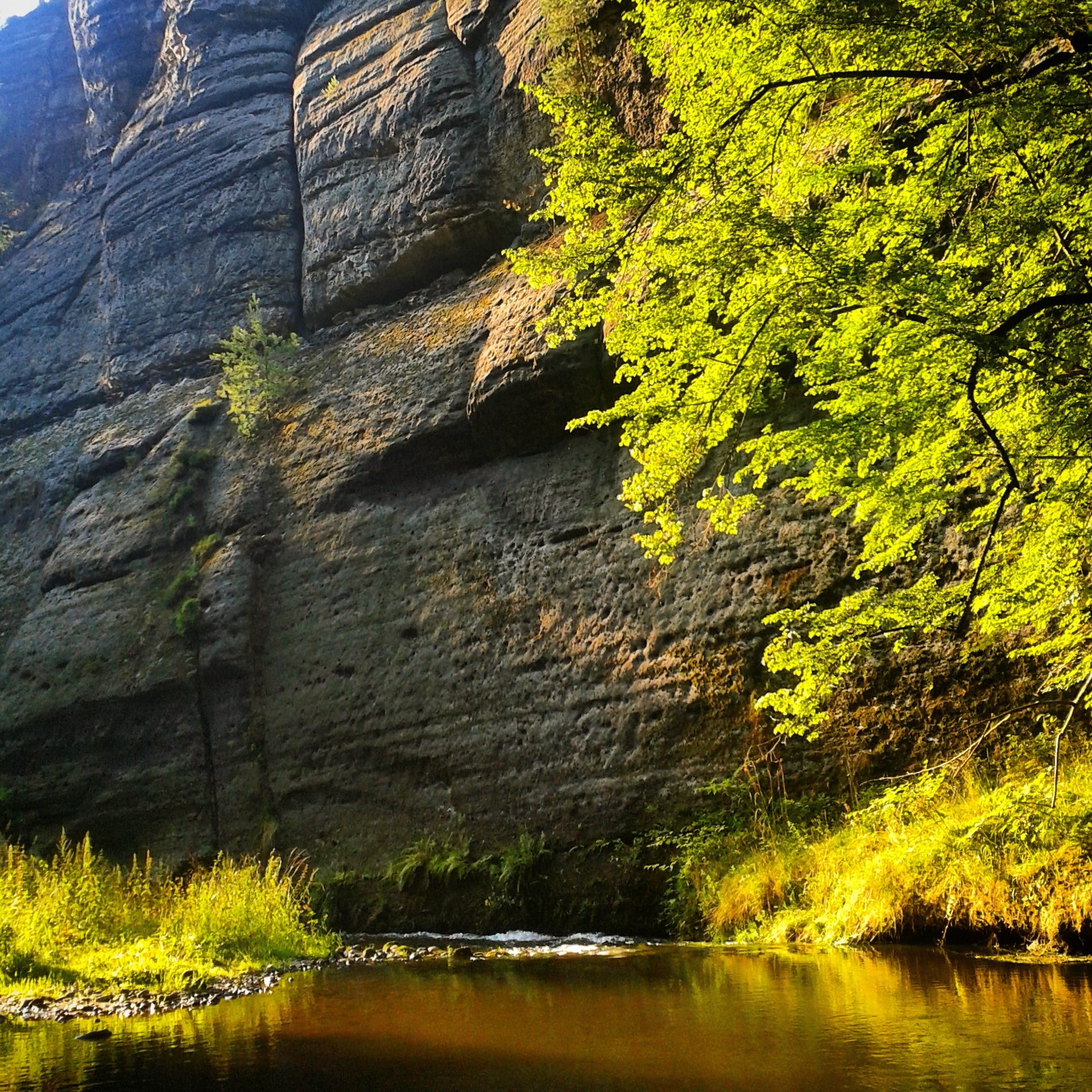 U kempu, poblíž Srbské Kamenice